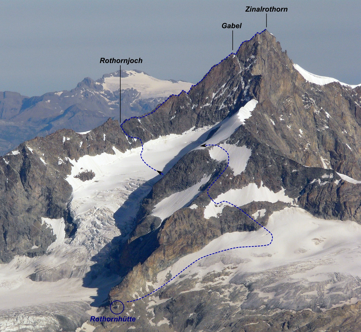 La Rothorngrat, cresta di salita al Zinalrothorn, con indicazioni di salita dal versante Zermatt